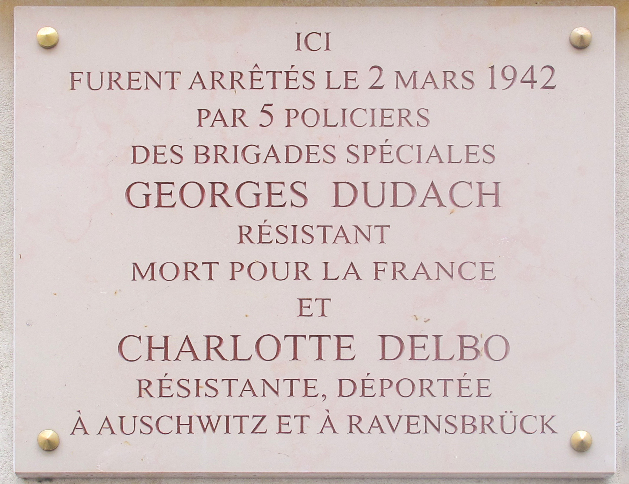 Plaque en hommage aux résistants Georges Dudach et Charlotte Delbo, arrêtés au 93 rue de la Faisanderie (Paris, 16e).